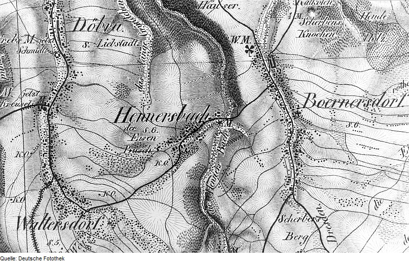 Original image description from the Deutsche Fotothek Bad Gottleuba-Berggießhübel-Hennersbach. Oberreit, Sect. Altenberg, 1821